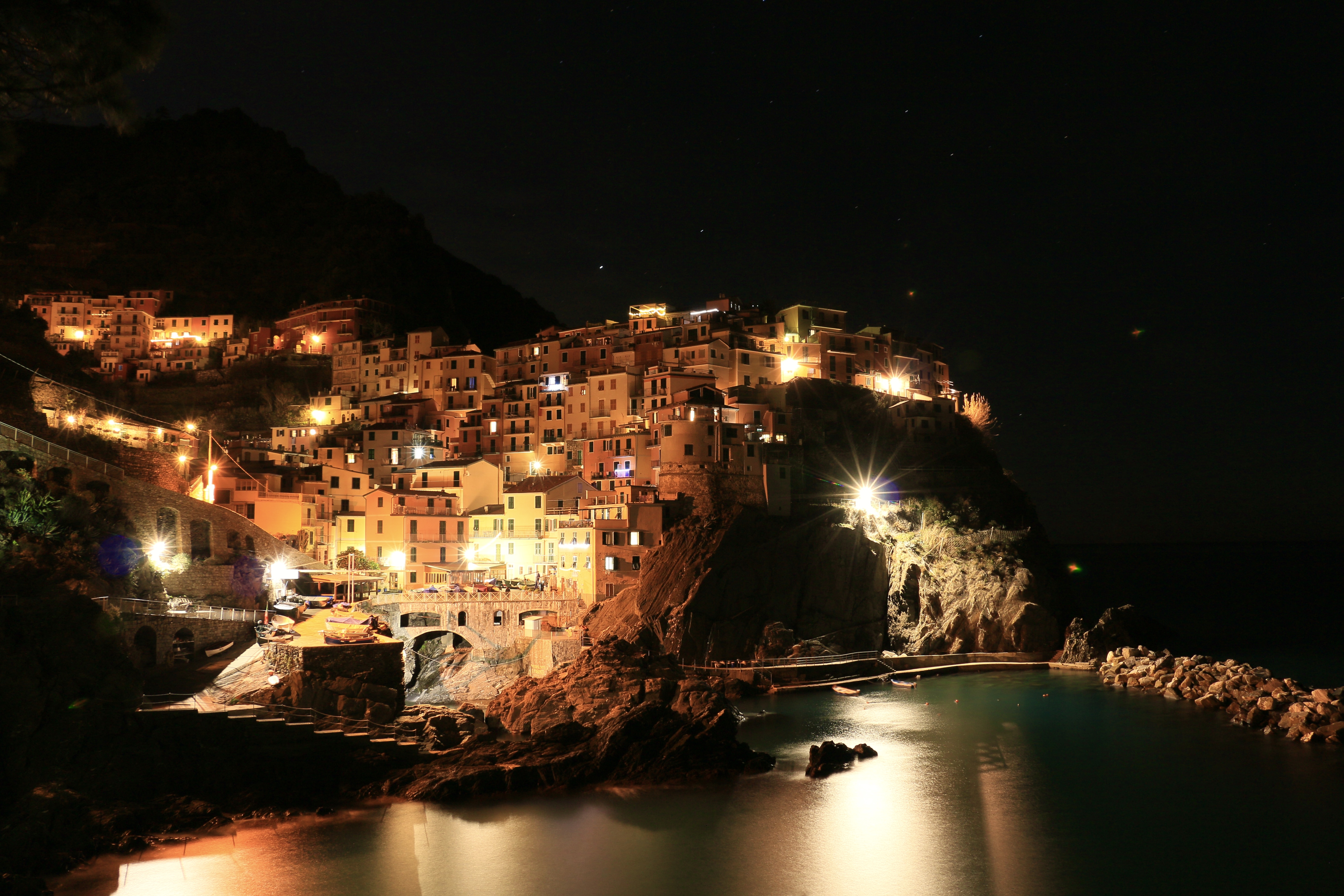 中文（中国大陆）: 马纳罗拉夜景